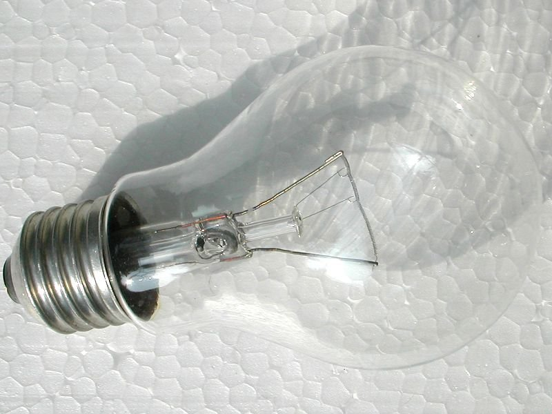 Lampe à incandescence (à filament). Photographie prise le 12 décembre 2003. Domaine Public.